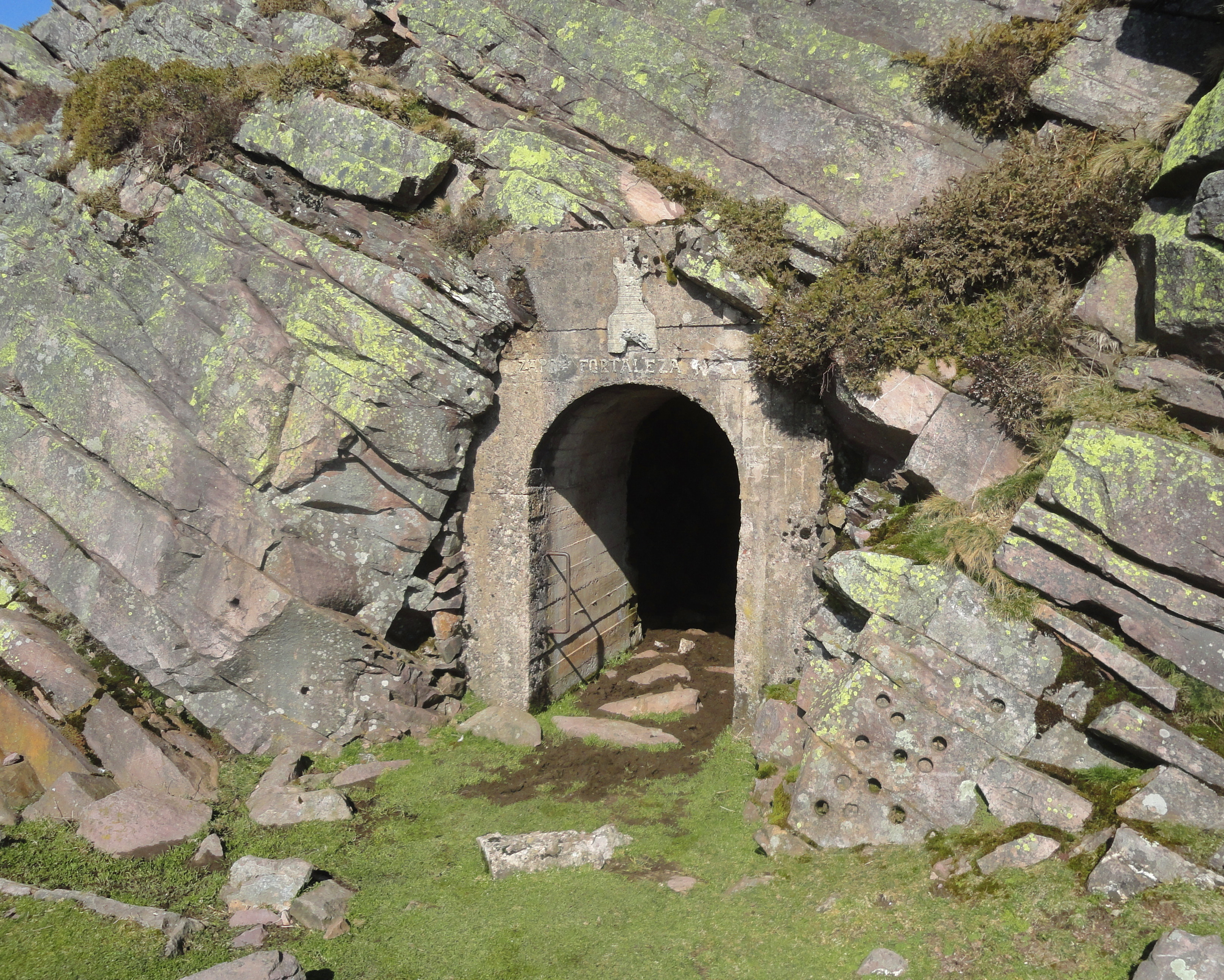 Alkurruntzko gotorlekua sarrera